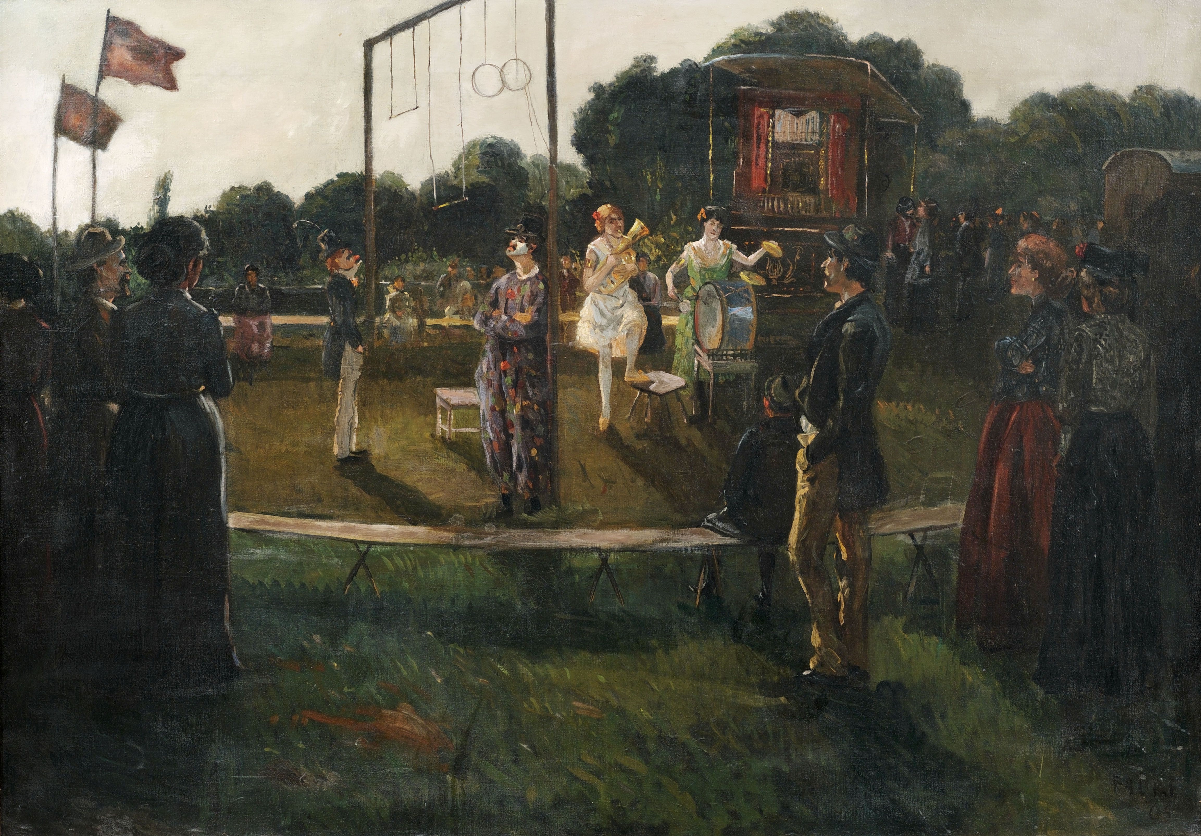 Wanderzirkus.